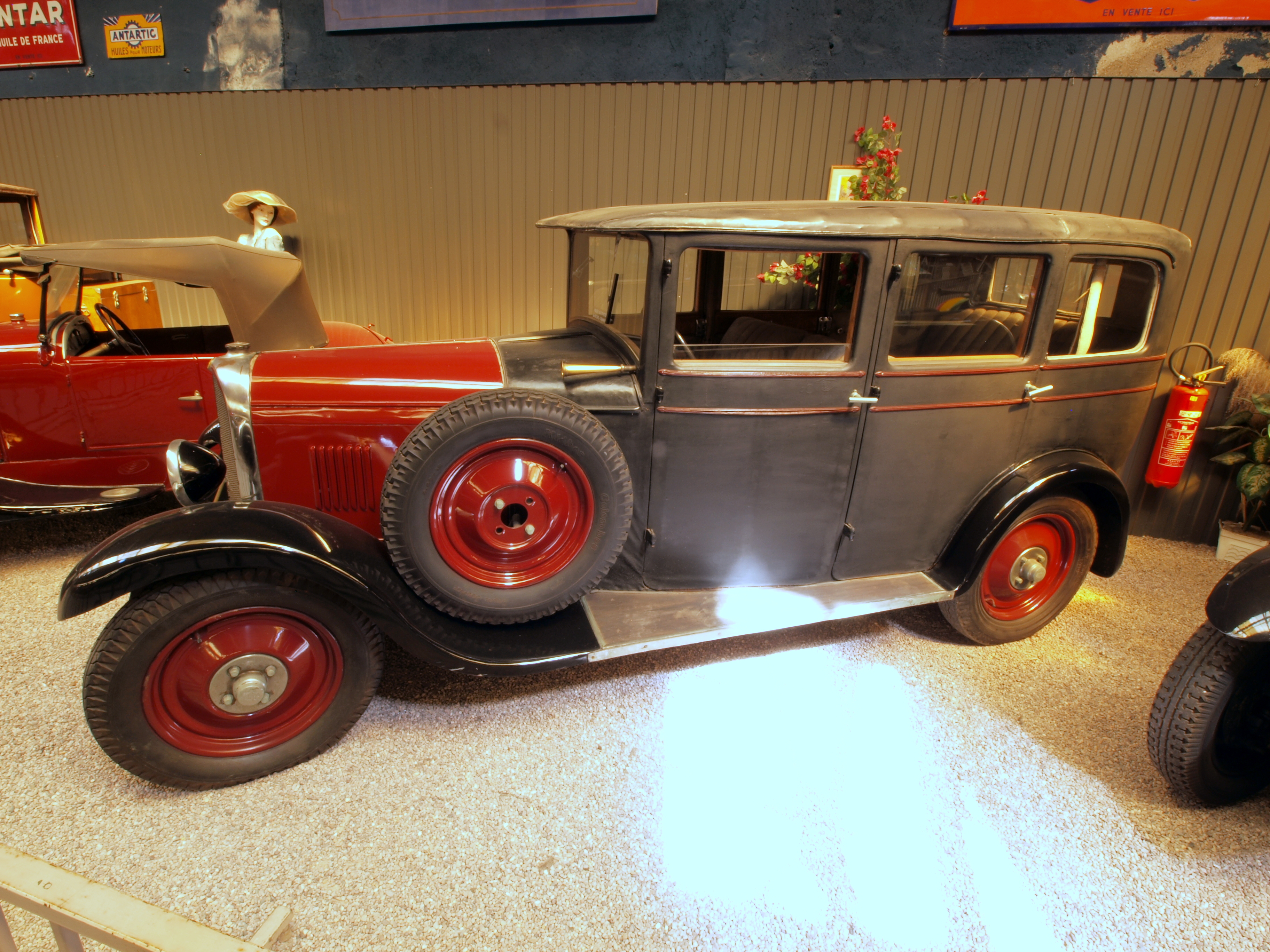 1927 Chaigneau-Brasier TD4